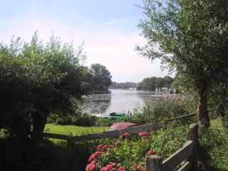 Vecht bij Nigtevecht; ik ben eigenaar